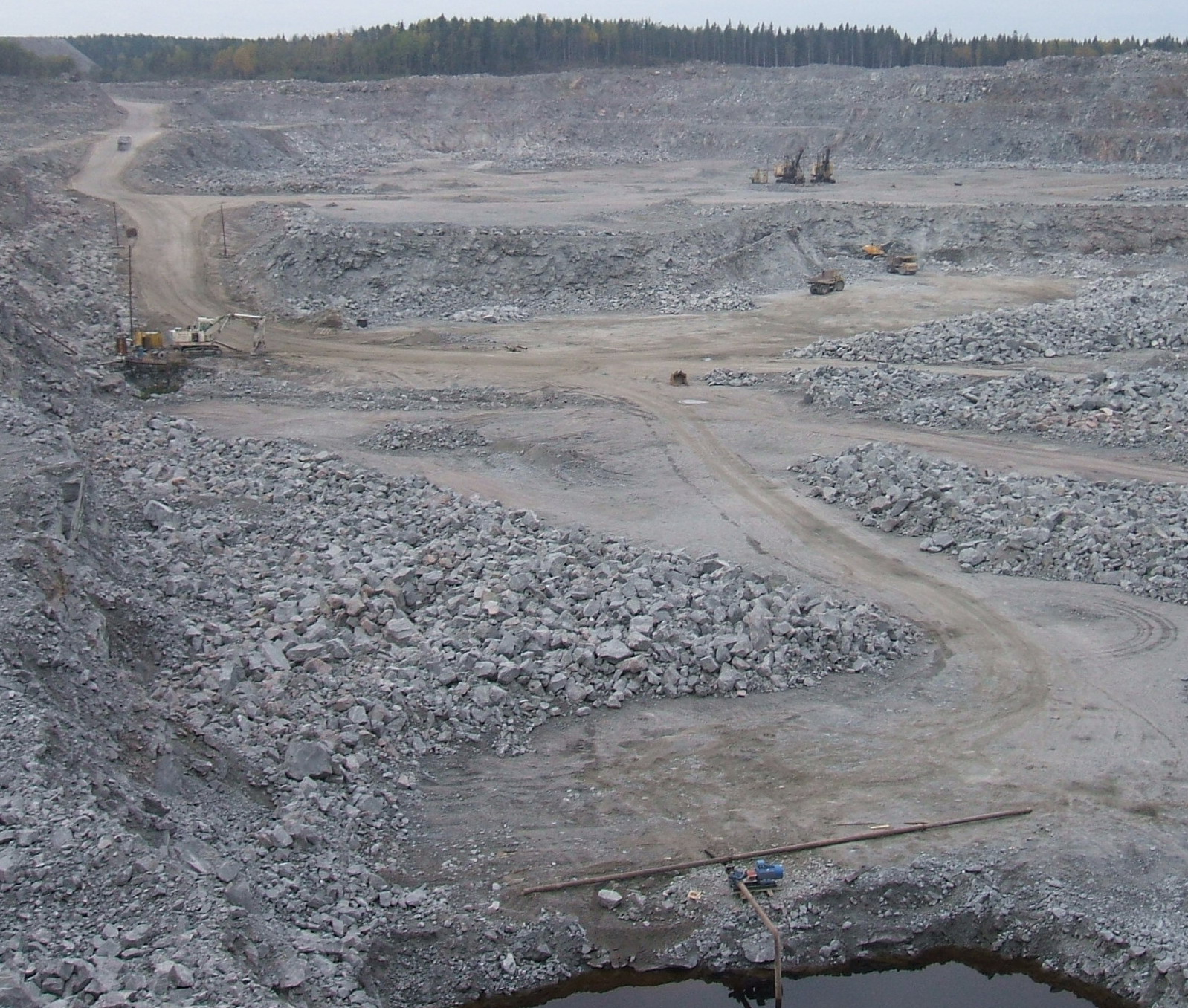 Виды п.Кузнечное Лен.обл.